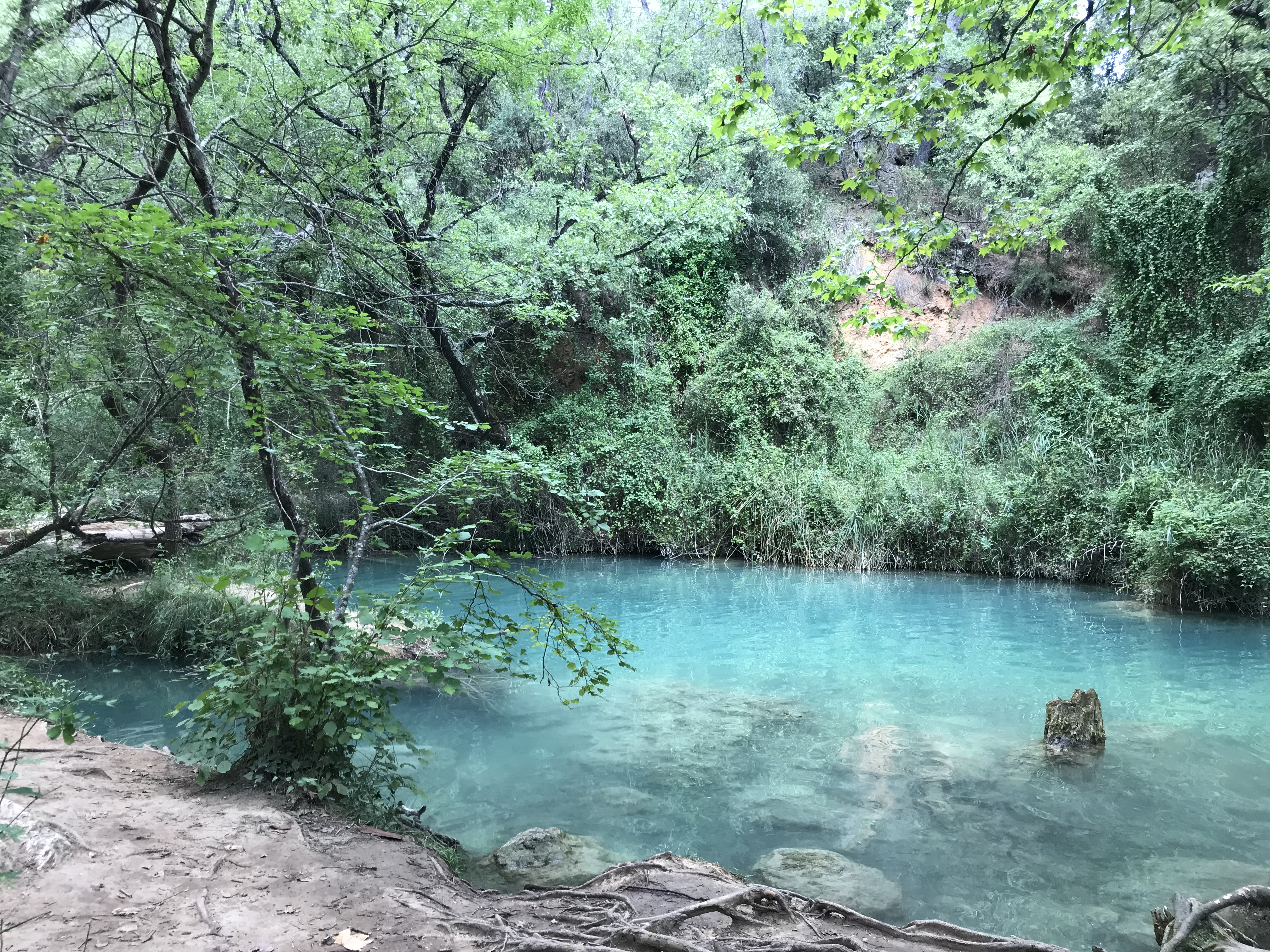 Eaux turquoises, végétation